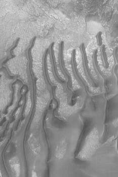 Noachis Terra